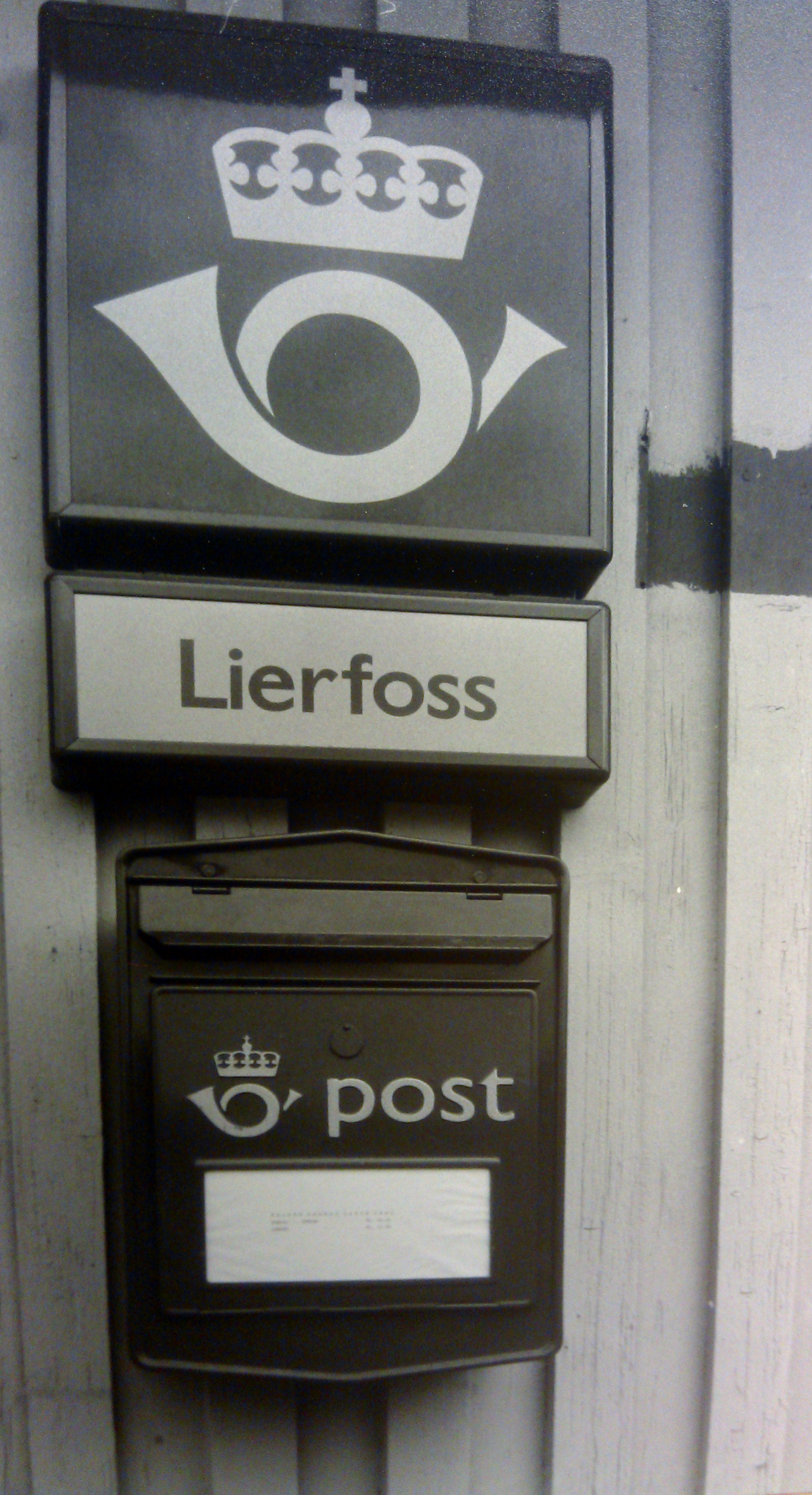 Lierfoss postkontor.